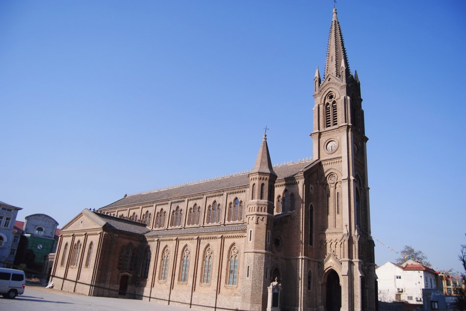 大名天主教堂建于1918年，为钟楼和礼拜堂一体的哥特式建筑，平面呈十字形，建筑材料为砖、石、木。做为近现代文物，于1993年7月15日入选河北省文保单位名单。